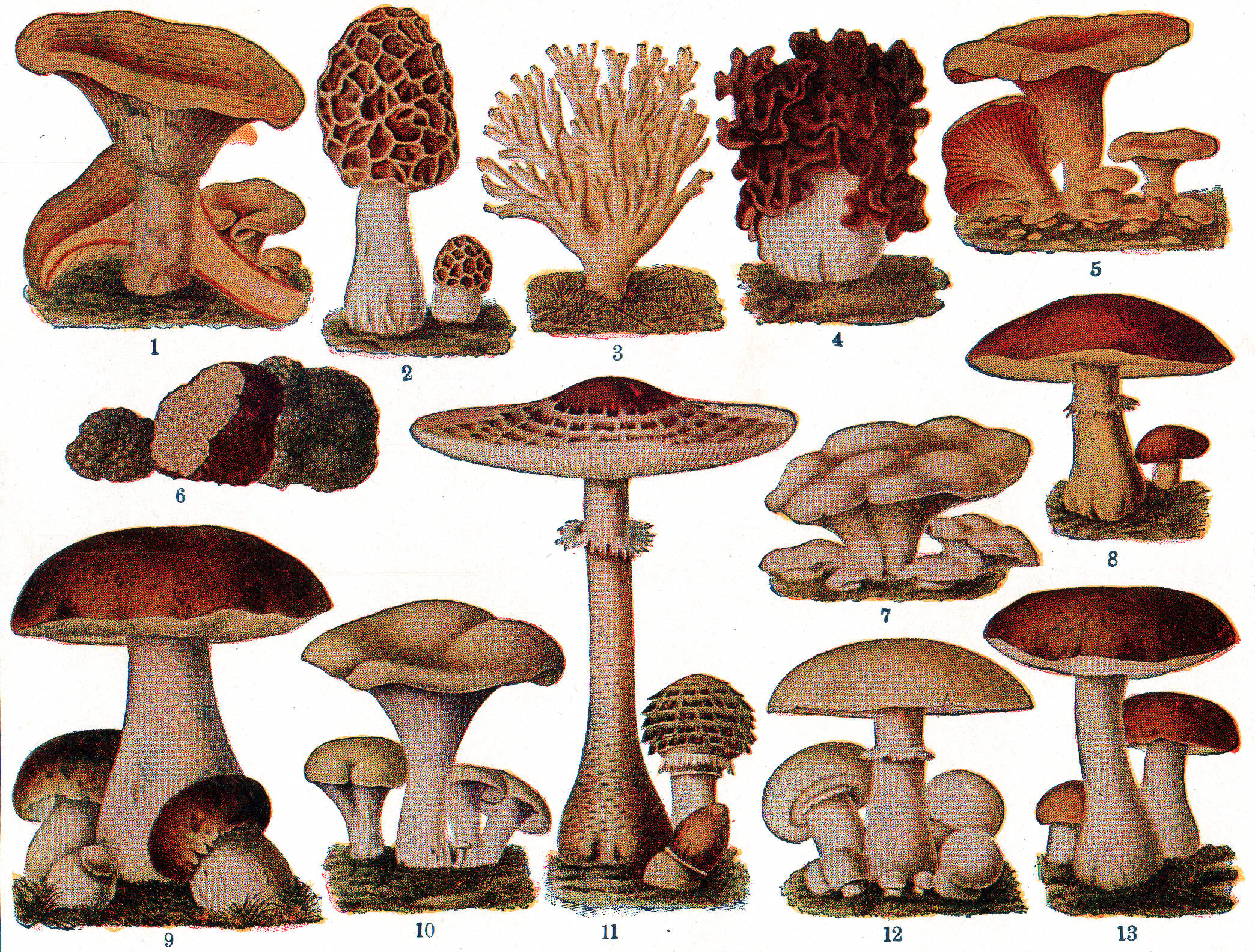 Edible Fungi